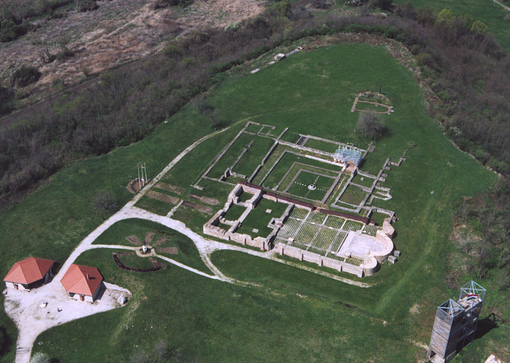 Szent Egyed apátság - Somogyvár - Hungary - Europe